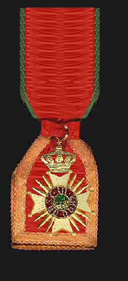 Eigen scan van een kruis in mijn verzameling.